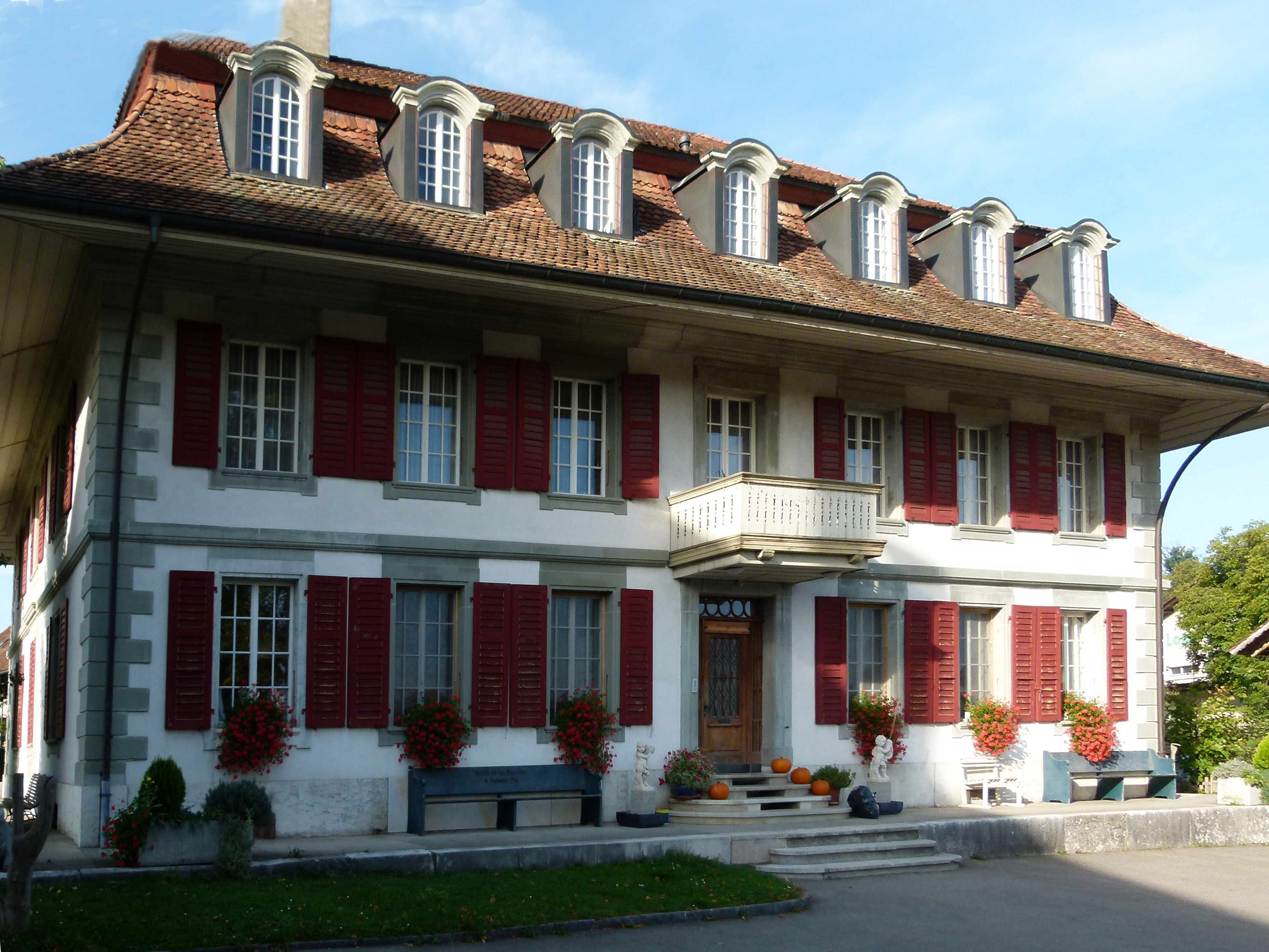 Koppigen, St. Niklaus Ehem. Bären Hofseite